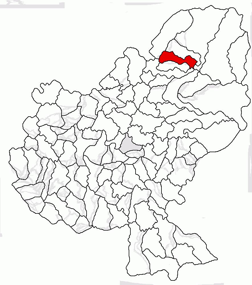 Categorie:Hărţi ale judeţului Mureş